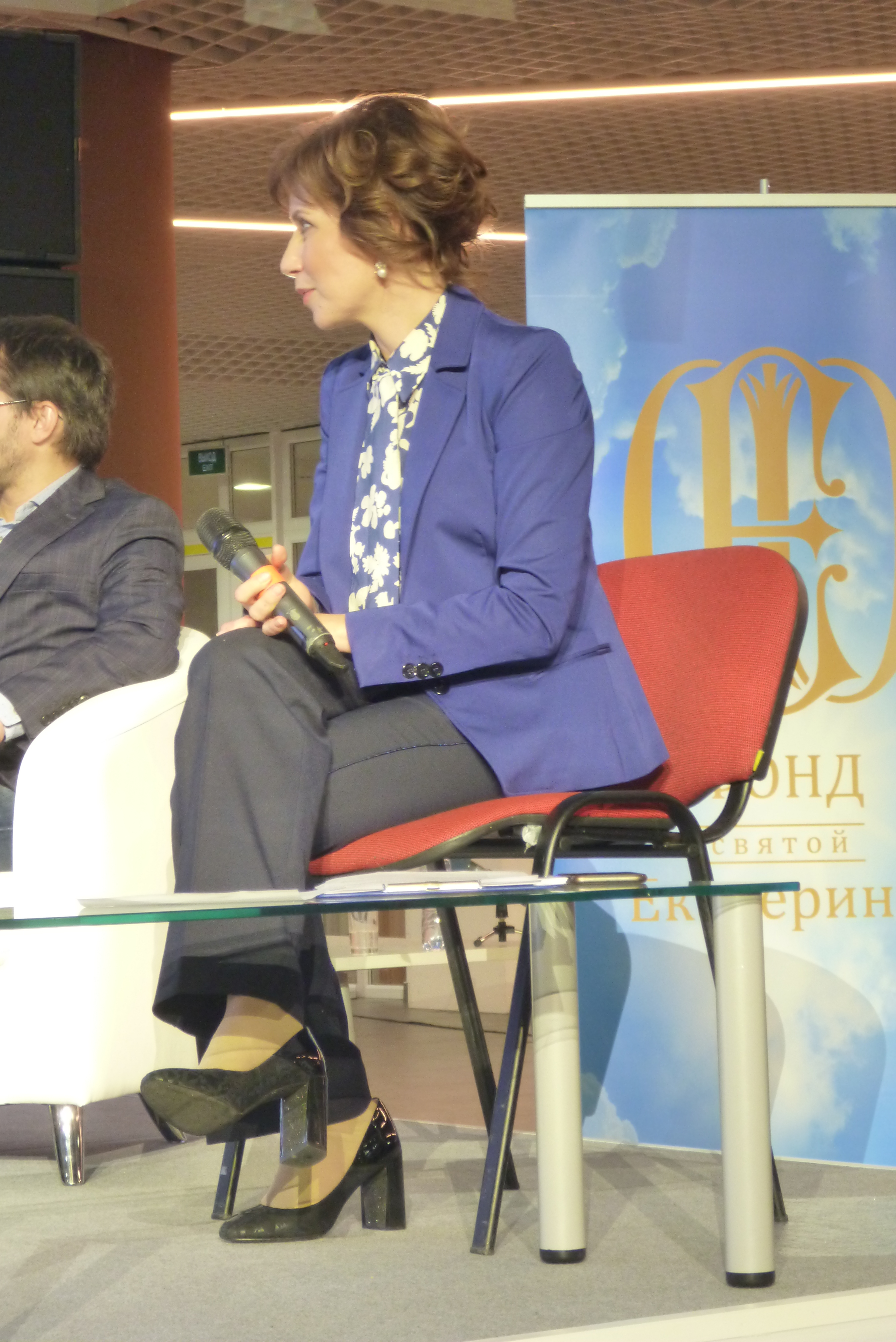 Светлана Автандиловна Зейналова на IX Уральском медиафоруме. Екатеринбург, 23 ноября 2018 года